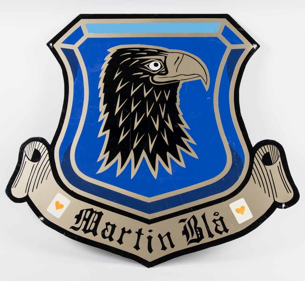 Divisionsemblem för Martin Blå, den andra divisionen vid Bråvalla flygflottilj (F 13)